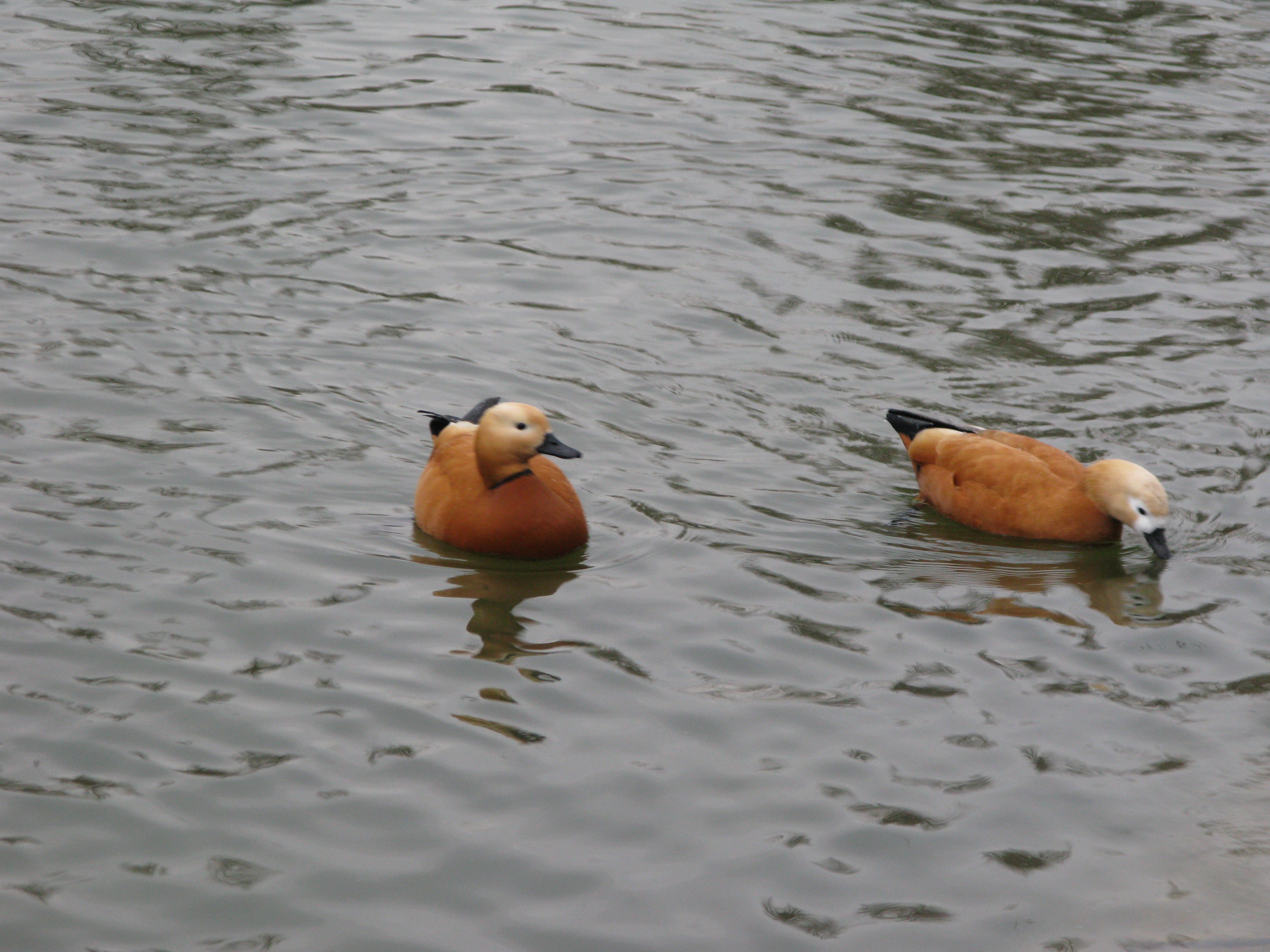 Tadorne casarca (tadorna ferruginea) au lac Daumesnil, à Paris.